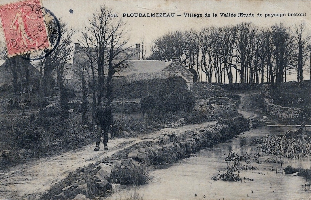 La ferme de Pen-ar-Creac'h en Lampaul-Ploudalmézeau vers 1900 (le cours d'eau visible sur la photographie est le Frout). La carte postale contient une erreur de légende car elle situe à tort cette ferme à Ploudalmézeau.